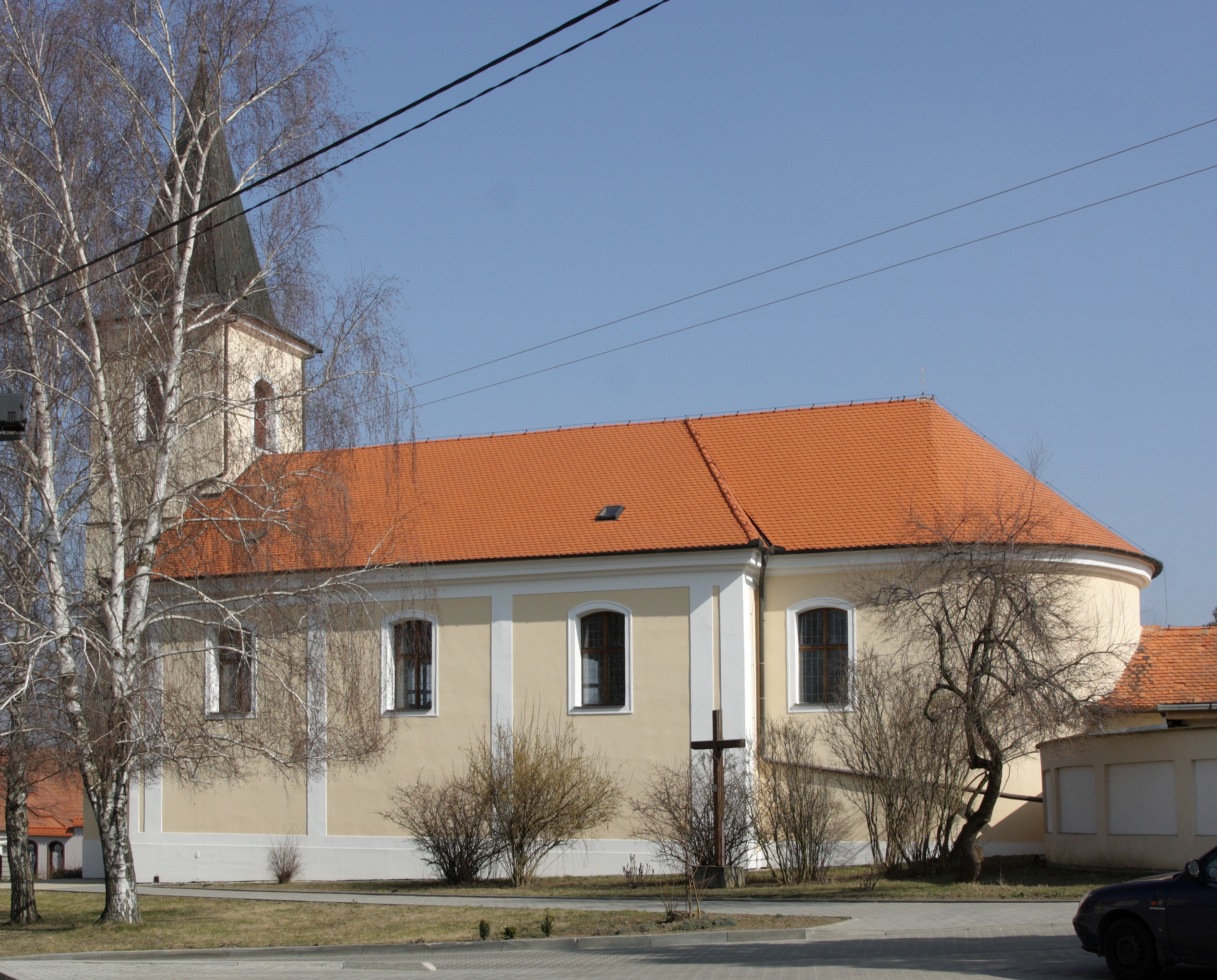 Křepice - kostel sv Bartoloměje.